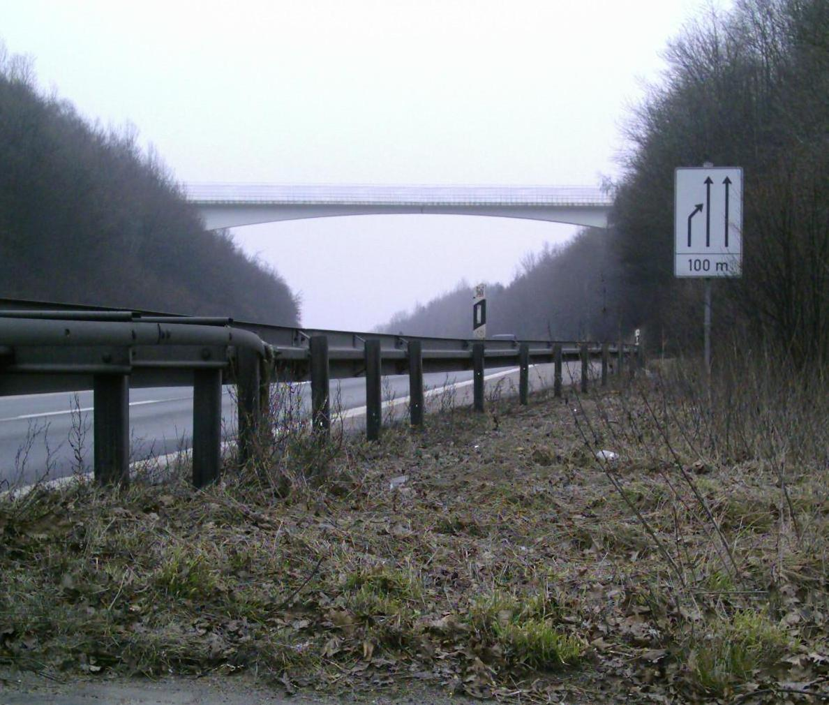 Das Bild zeigt den Hermannsweg, welcher die A1 am Leedener Berg nahe Tecklenburg in Form einer eindrucksvollen Bogenbrücke überquert. Von der Hermannsbrücke aus hat man einen wunderbaren Blick auf die A1 in den Höhen des Teutoburger Waldes.